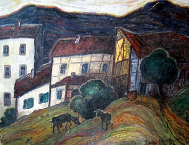 Louis Ziercke Pützborn (Ziegen vor dem Dorf), 1932